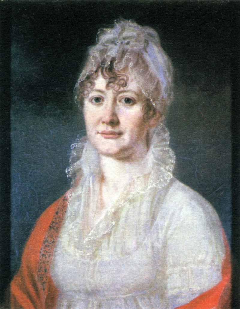 Арсеньева Елизавета Алексеевна (урожд. Столыпина) (1773–1845 гг.), бабушка русского поэта М. Ю. Лермонтова по материнской линии.